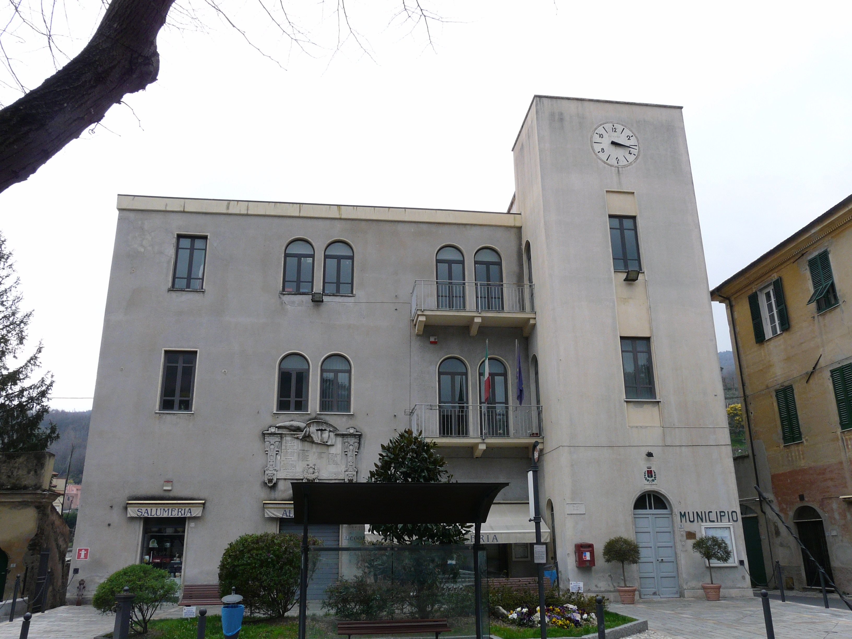 Municipio di Calice Ligure, Liguria, Italia